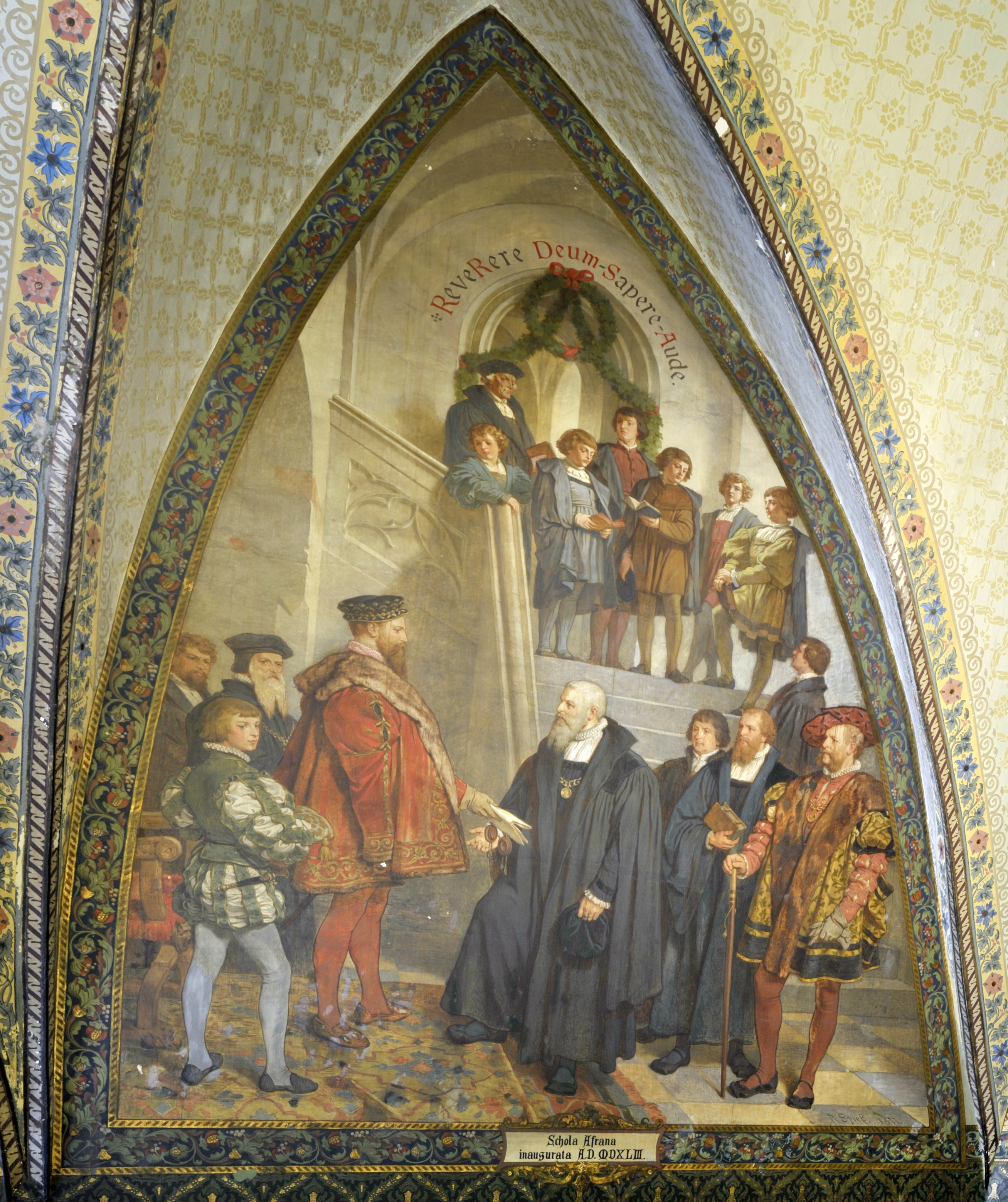 Kurfürst Moritz eröffnet die Fürstenschule zu St. Afra im Jahr 1543